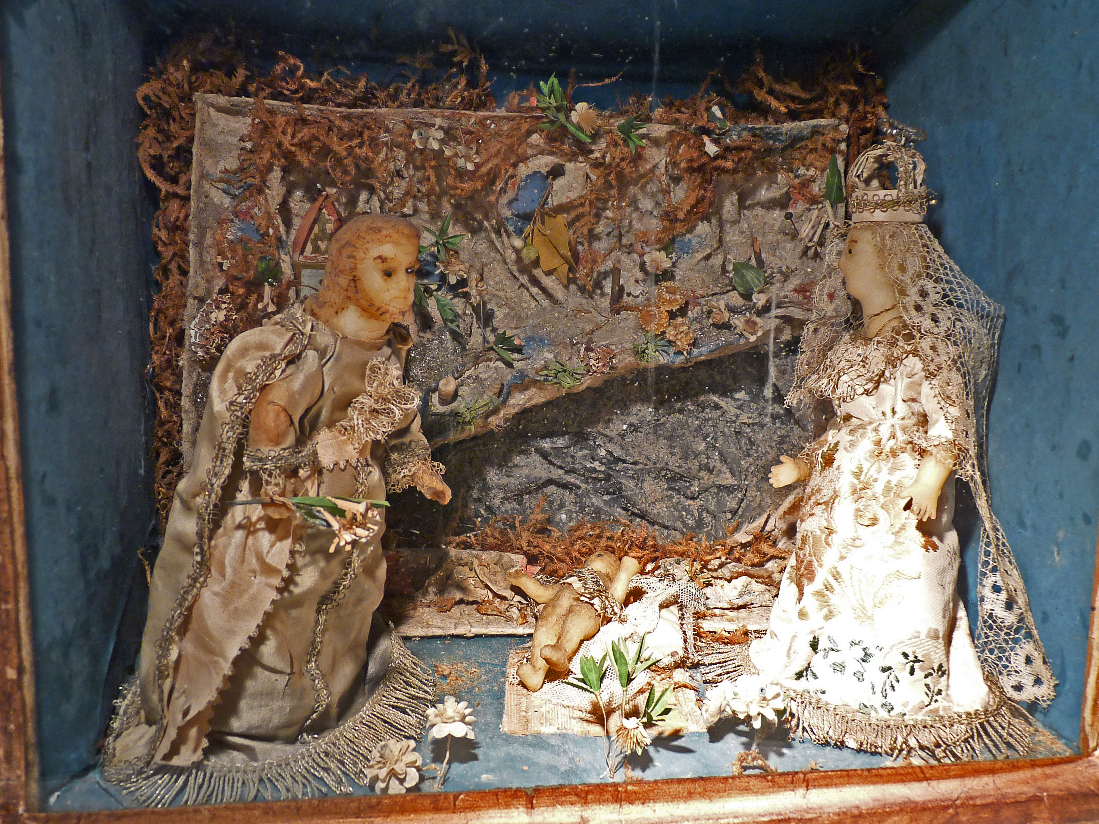 Crèche (cire habillée, début du XIXe siècle). Musée Charles de Bruyères à Remiremont.